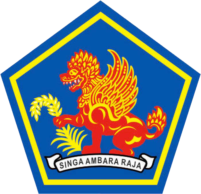 Coat of Arms (Lambang) of Buleleng Regency (Kabupaten), Bali, Indonesia